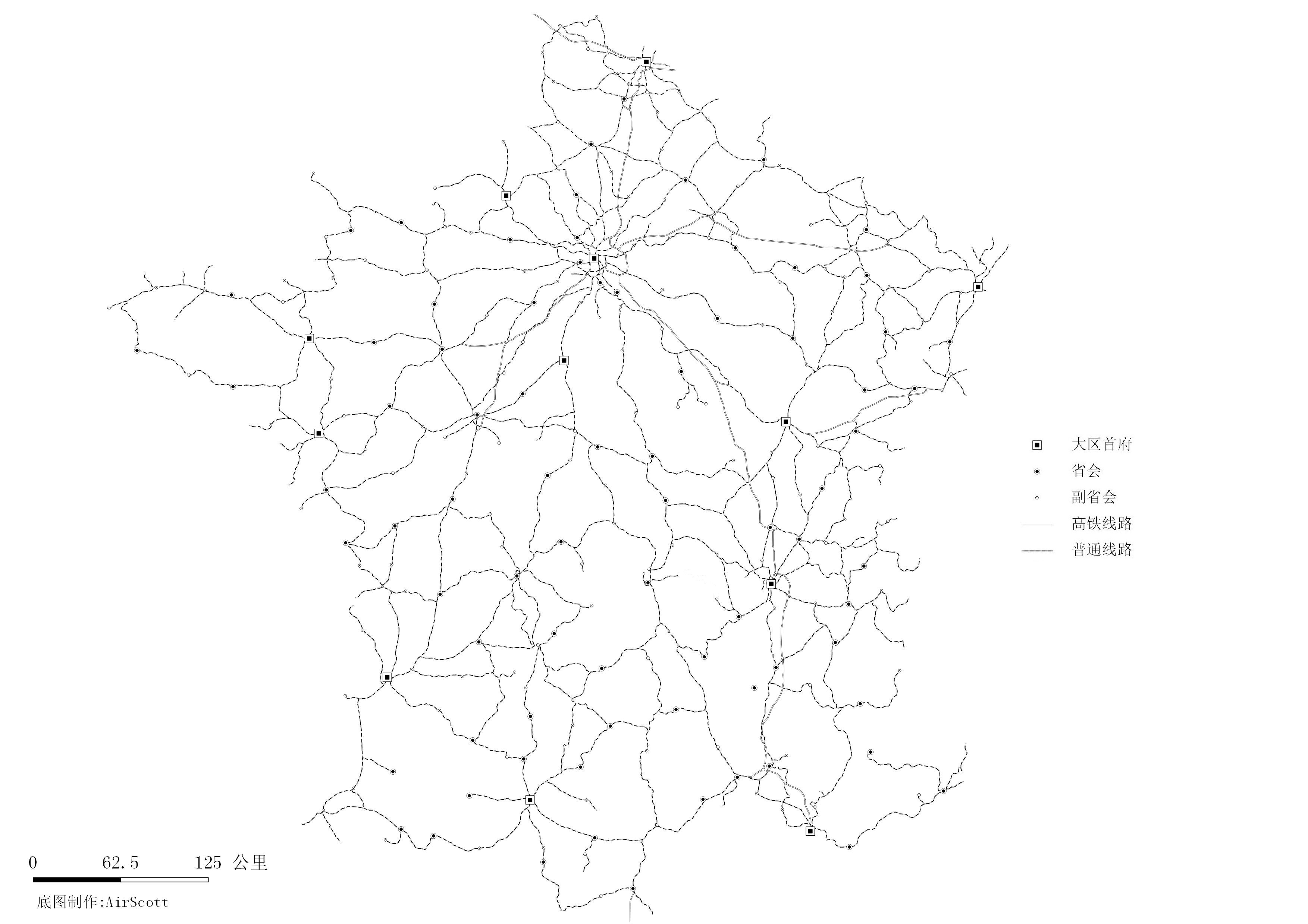 Les lignes ferroviaires en France qui sont encore ouvertes pour la service de voyageur